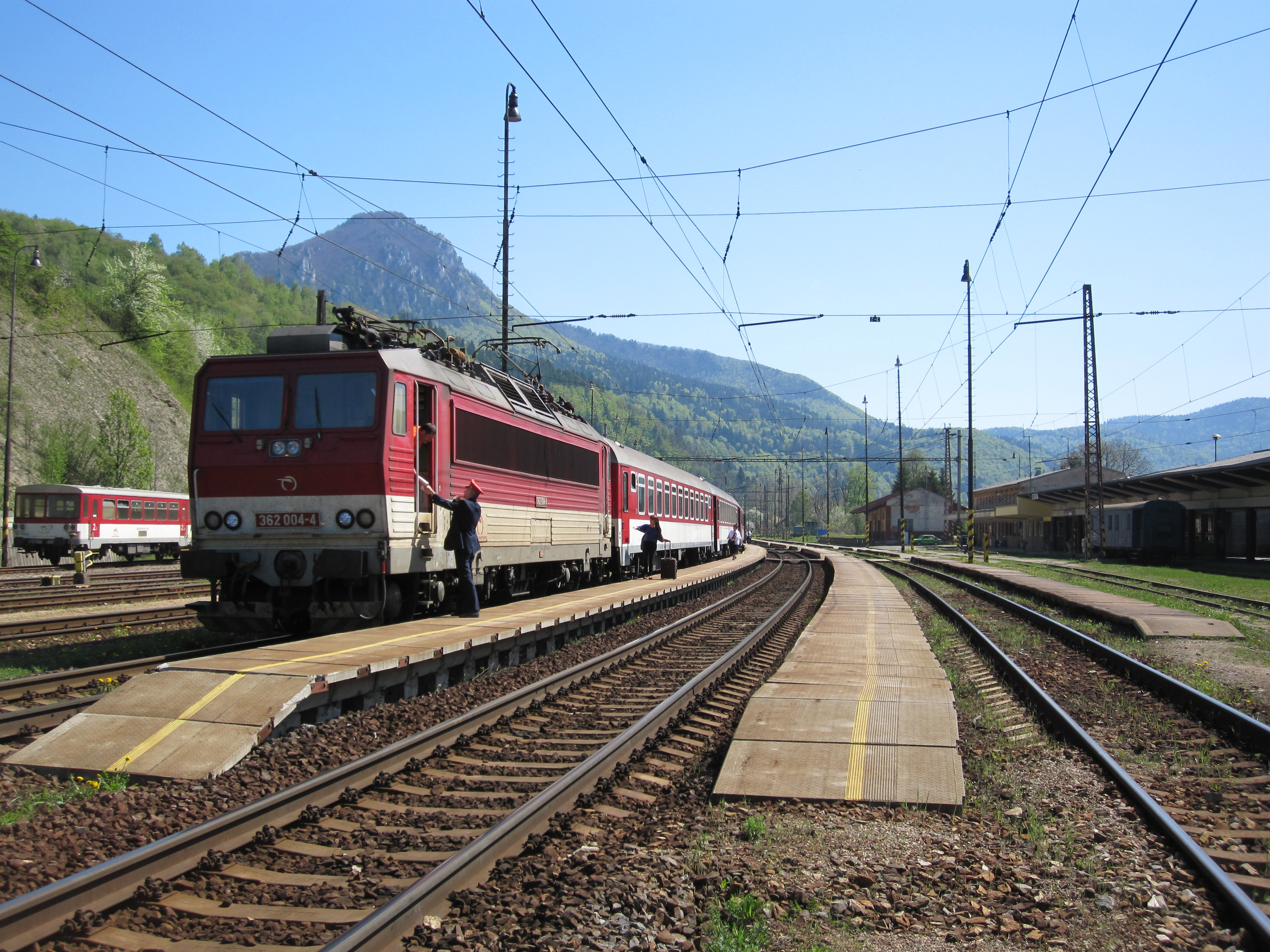 Vlak Železniční společnosti Slovensko s elektrickou lokomotivou 362.004, Kraľovany